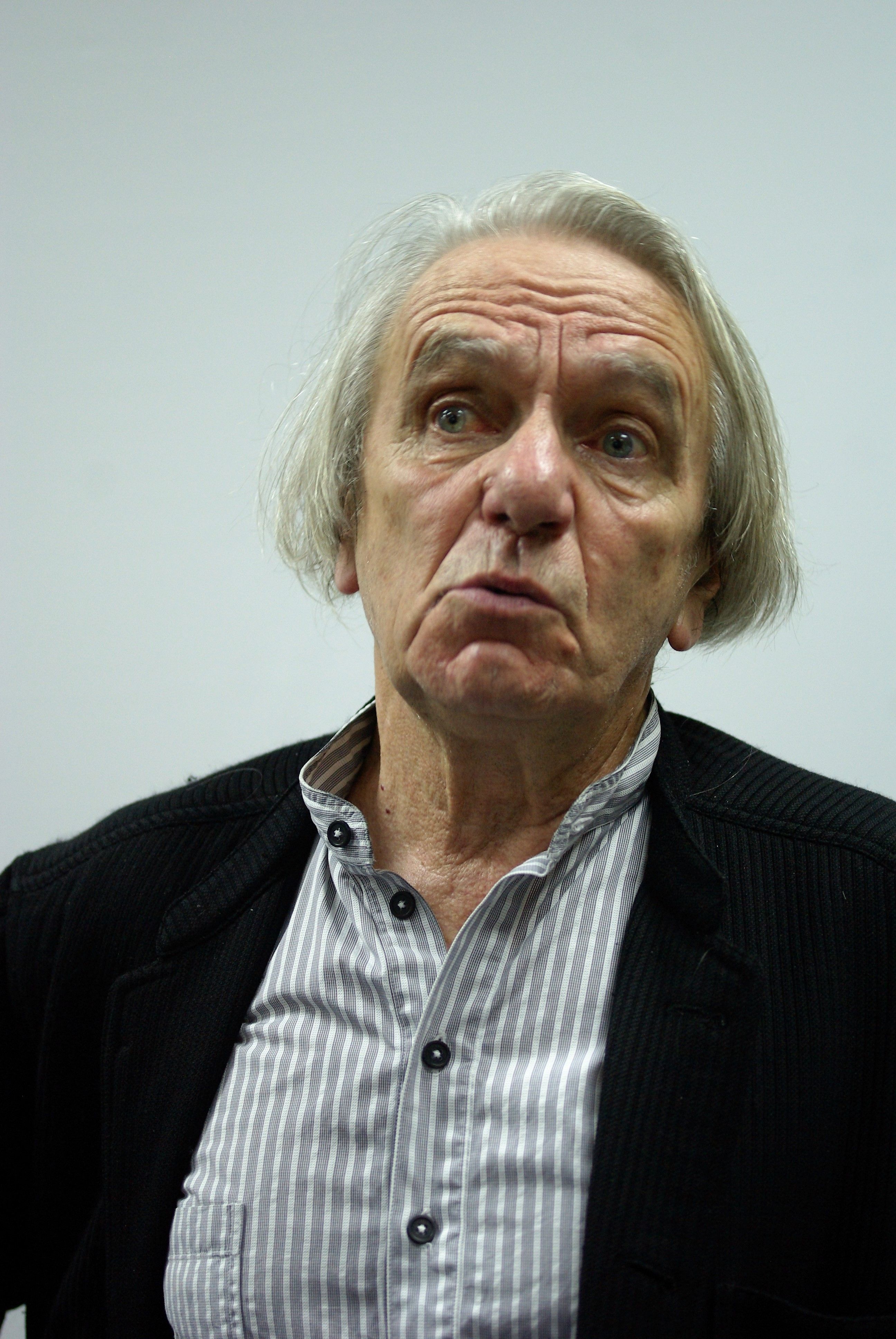 El filósofo francés Jacques Rancière en un encuentro en la biblioteca de la Facultad de Humanidades de la Universidad de Valparaíso